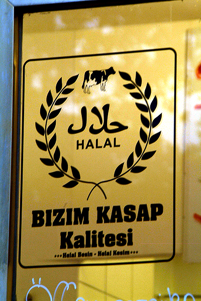 "Halal" sichert diese auf das Schaufenster geklebte Klarsichtfolie zu: "Bizim Kasap, Kalitesi, Helal Besin, Helal Kesim". Mutlu Elveren, Inhaber des Fleischgeschäftes am Klagesmarkt 18 in Hannover, bewirbt sein Fleisch von Lamm, Rind und Geflügel ausdrücklich "frisch aus meiner Region" ...